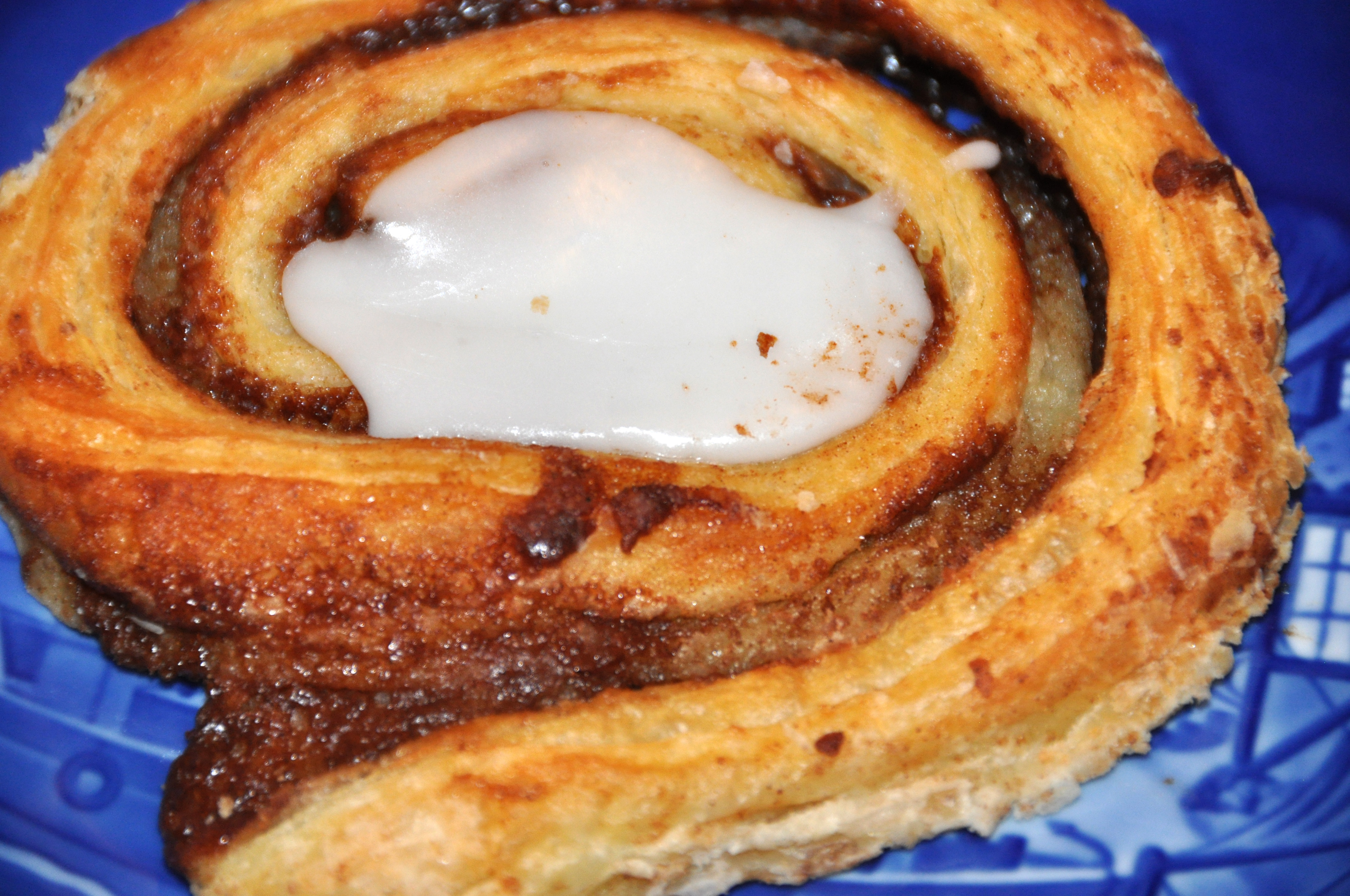 Kanelsnegl